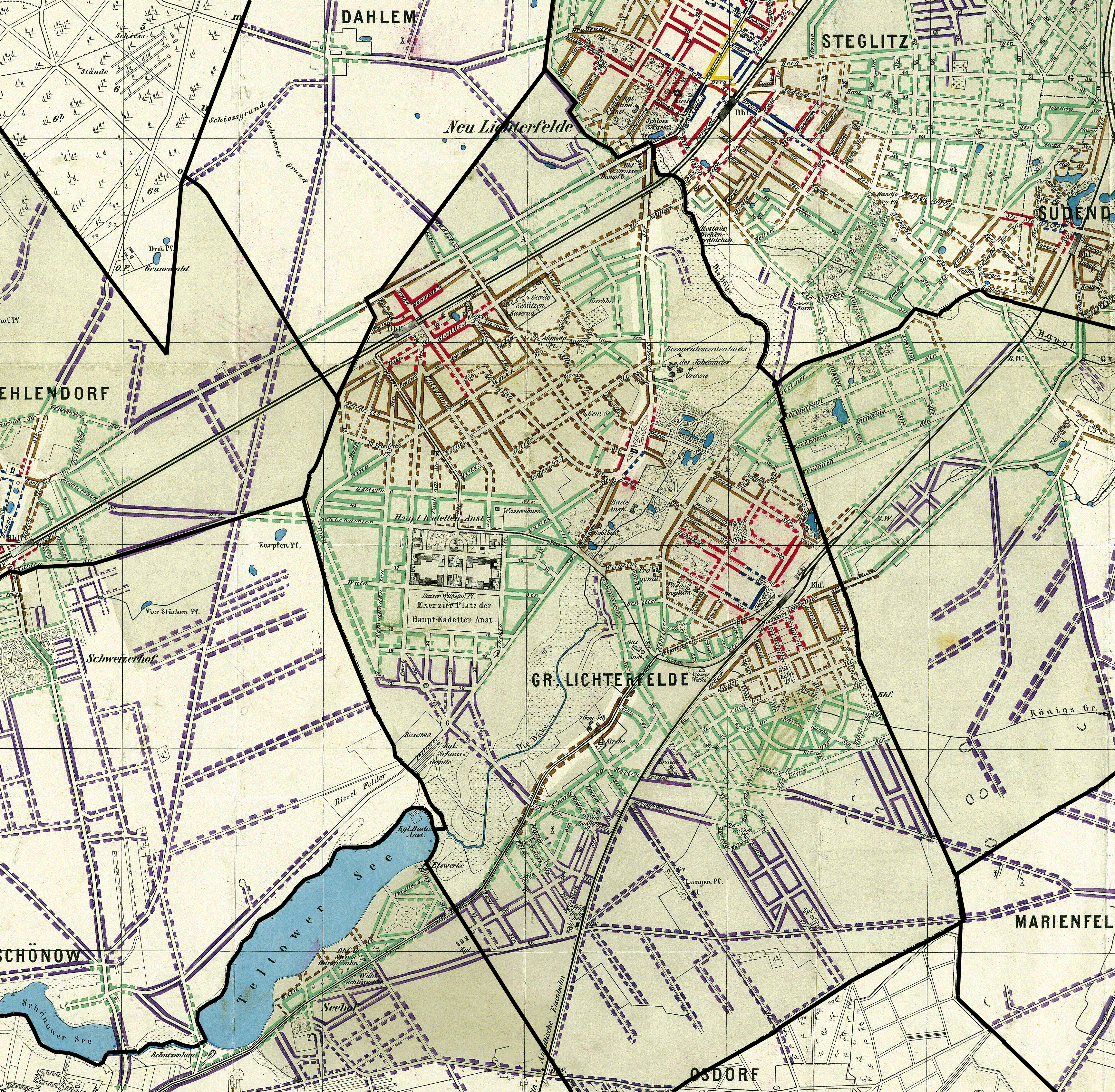 Die Landgemeinde Lichterfelde südlich von Berlin und deren Straße, einschließlich Gemeindegrenzen (1884) auf Basis der Map for calculating the value of ground and floor in the southwest suburbs of Berlin Scanned by the Zentral- und Landesbibliothek Berlin (ZLB), use under Public Domain allowedMap for calculating the value of ground and floor in the southwest suburbs of Berlin Scanned by the Zentral- und Landesbibliothek Berlin (ZLB), use under Public Domain allowed Die Landgemeinde Lichterfelde südlich von Berlin und deren Straßen (1892), einschließlich Gemeindegrenzen (1884) auf Basis der Map for calculating the value of ground and floor in the southwest suburbs of Berlin Scanned by the Zentral- und Landesbibliothek Berlin (ZLB), use under Public Domain allowedMap for calculating the value of ground and floor in the southwest suburbs of Berlin Scanned by the Zentral- und Landesbibliothek Berlin (ZLB), use under Public Domain allowed